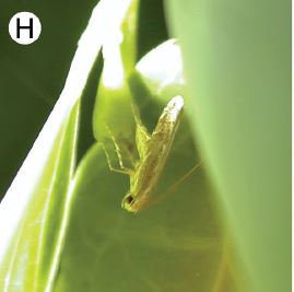 Epicephala vitisidaea